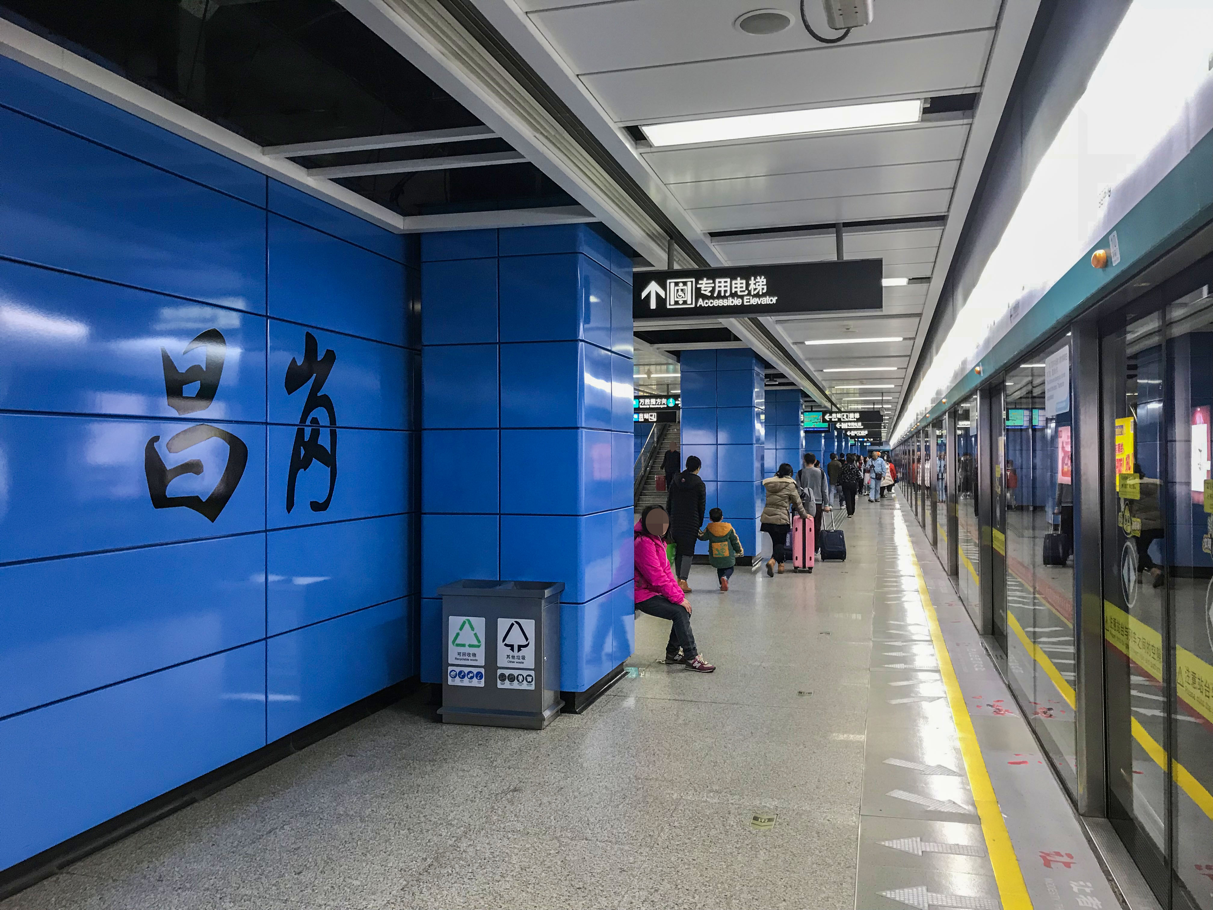 广州地铁昌岗站